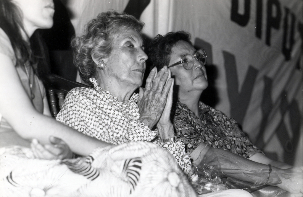 Hortensia Bussi de Allende y María Elena Carrera, en la campaña electoral de 1989.